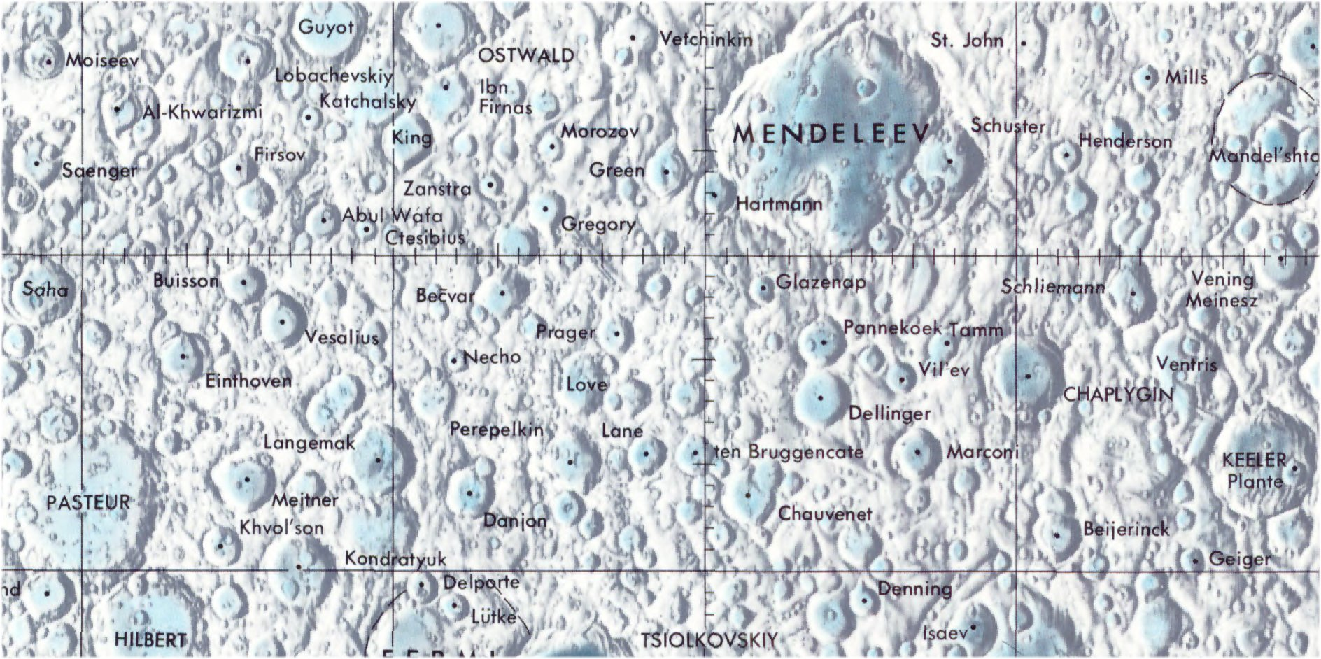 Cráter lunar Prager. Localización. (Lunar Chart LPC1. Second Edition)